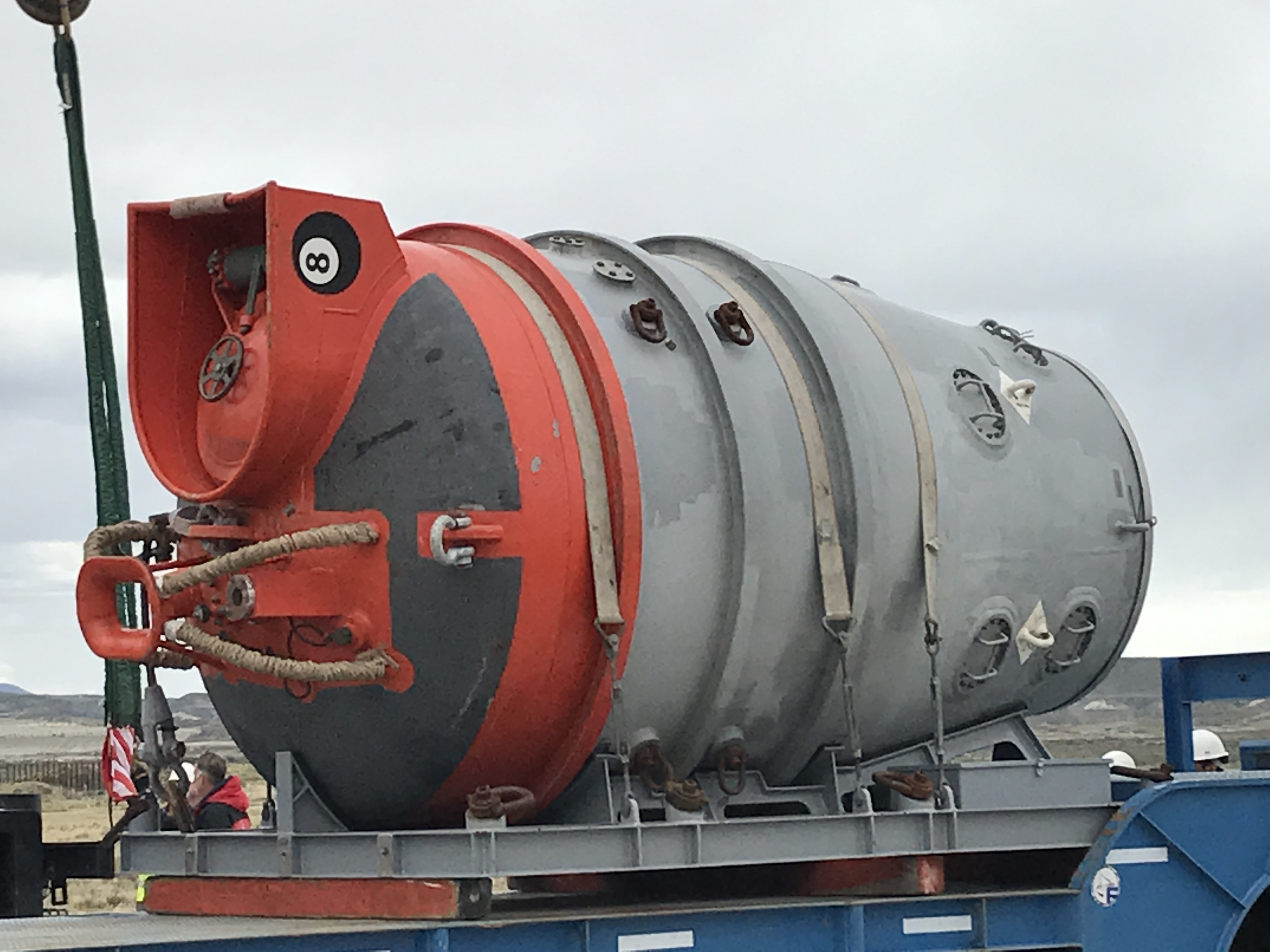 Cámara de rescate submarino de la Armada Estadounidense durante la búsqueda del submarino argentino ARA San Juan